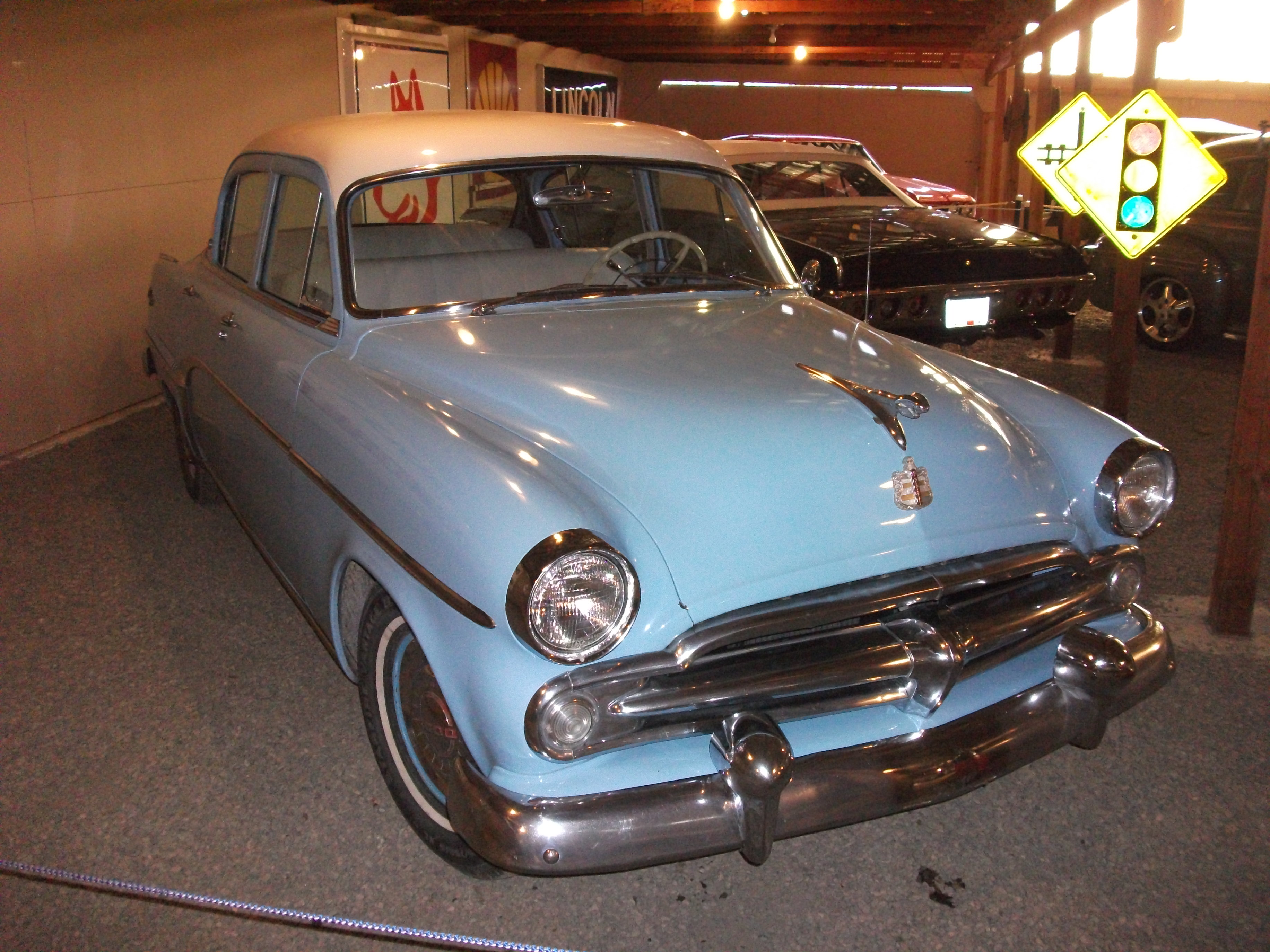 Canadian 1954 Dodge Mayfair